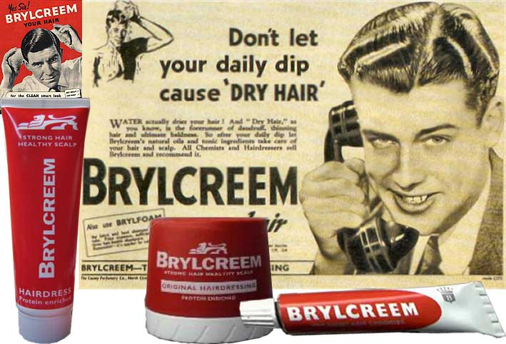 brylcremesförpackningar nu och förr samt gamla reklamklipp collage läderjackan 25 mars 2007